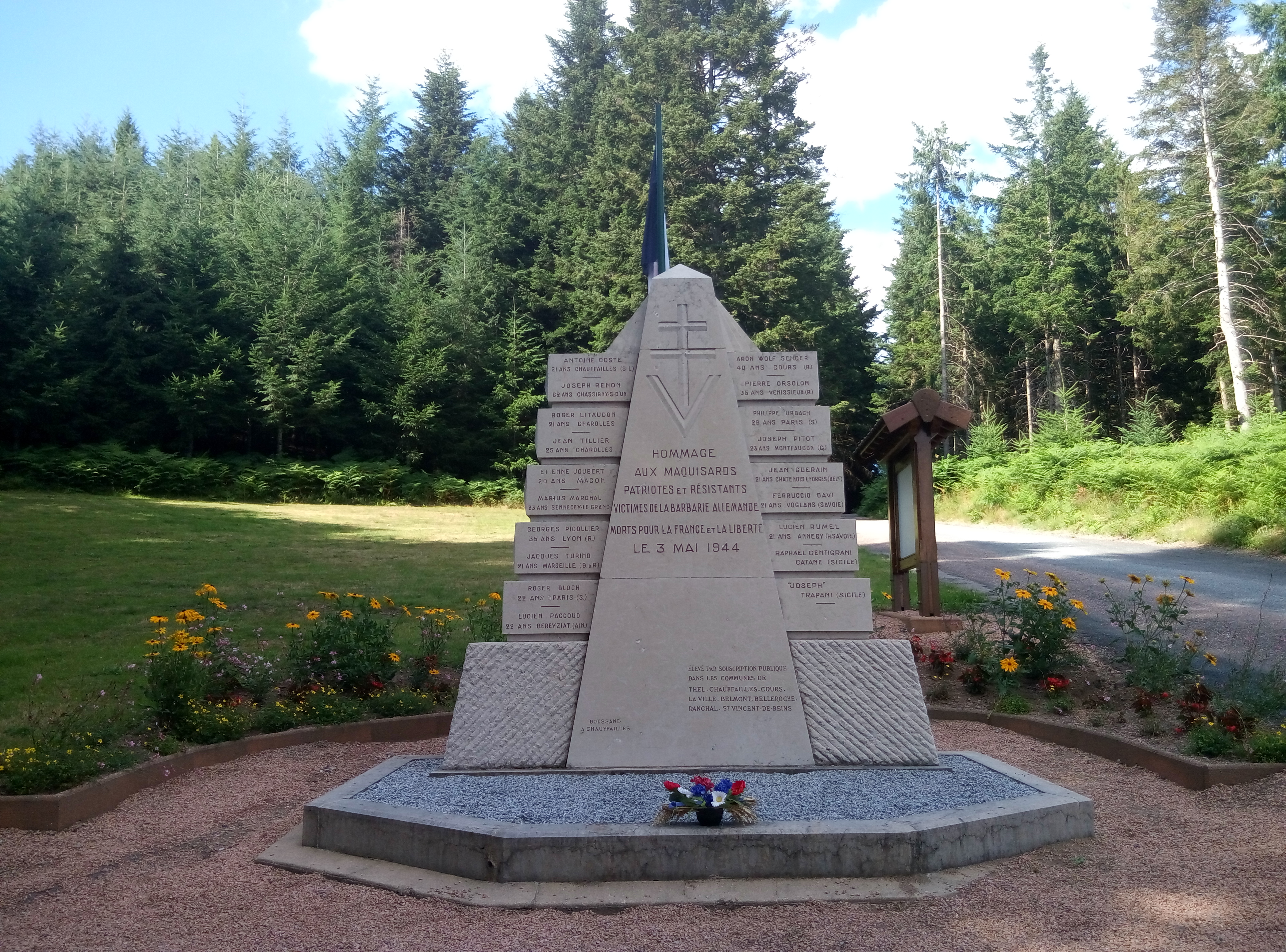 Le mémorial de Thel à Cours (Rhône, France).